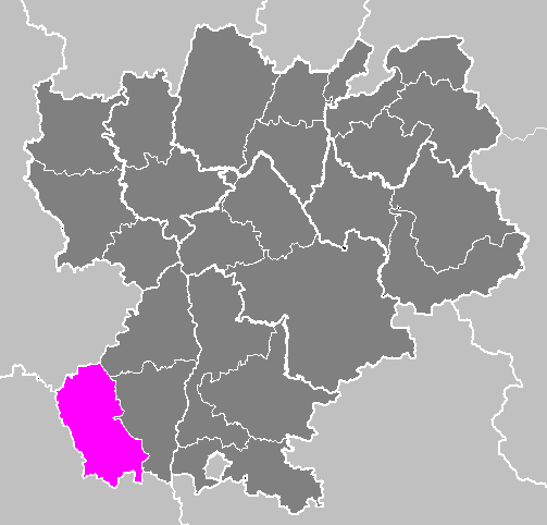 Maps of arrondissements and cantons of France: Arrondissement de Largentière.PNG (Région Rhône-Alpes)